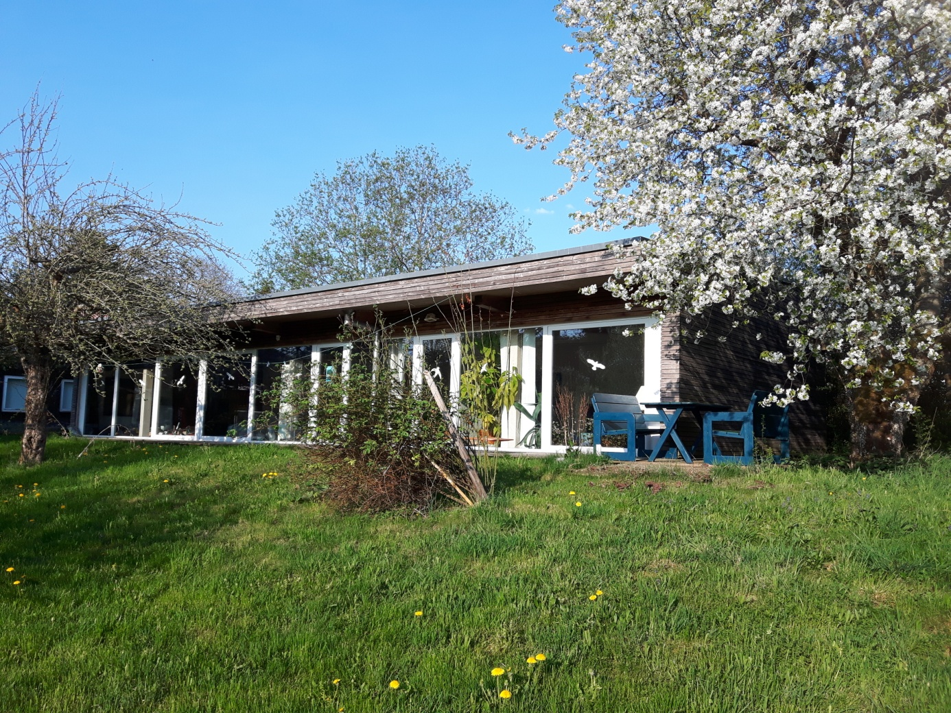 Bild von Günther Reger